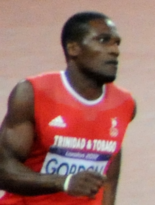 Finale du 400m hommes des jeux olympiques de Londres, 2012, Lalonde Gordon